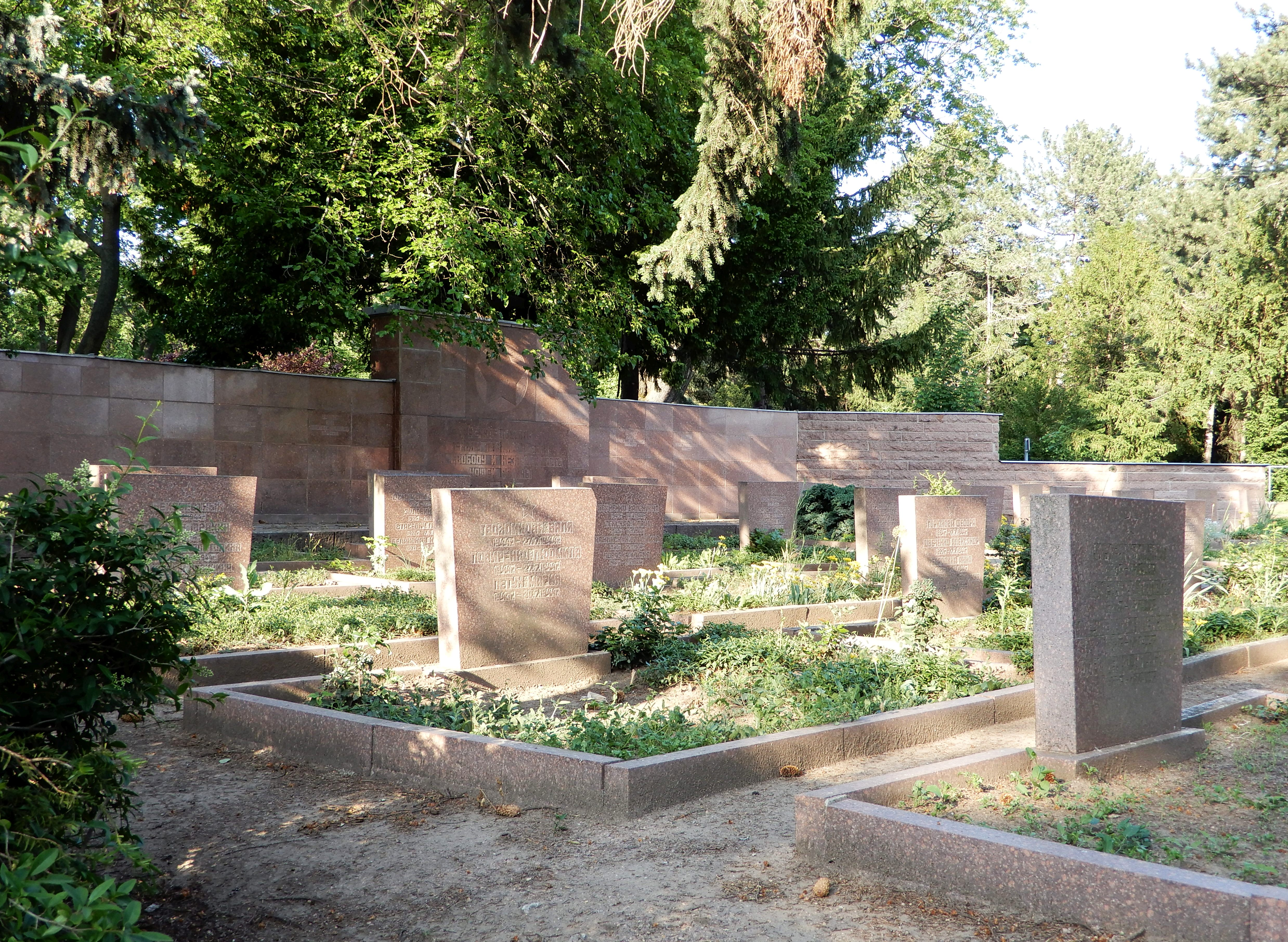 Sowjetischer Ehrenfriedhof auf dem Friedhof Aschersleben.